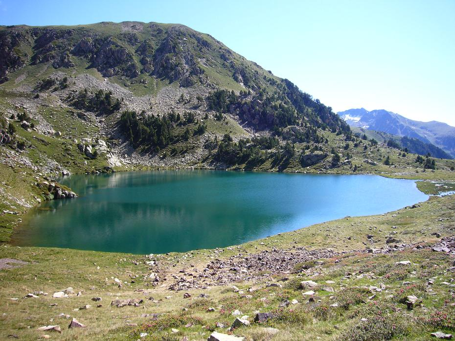 Estany Roi vist des de ponent; la Vall de Boí, Alta Ribagorça, Catalunya